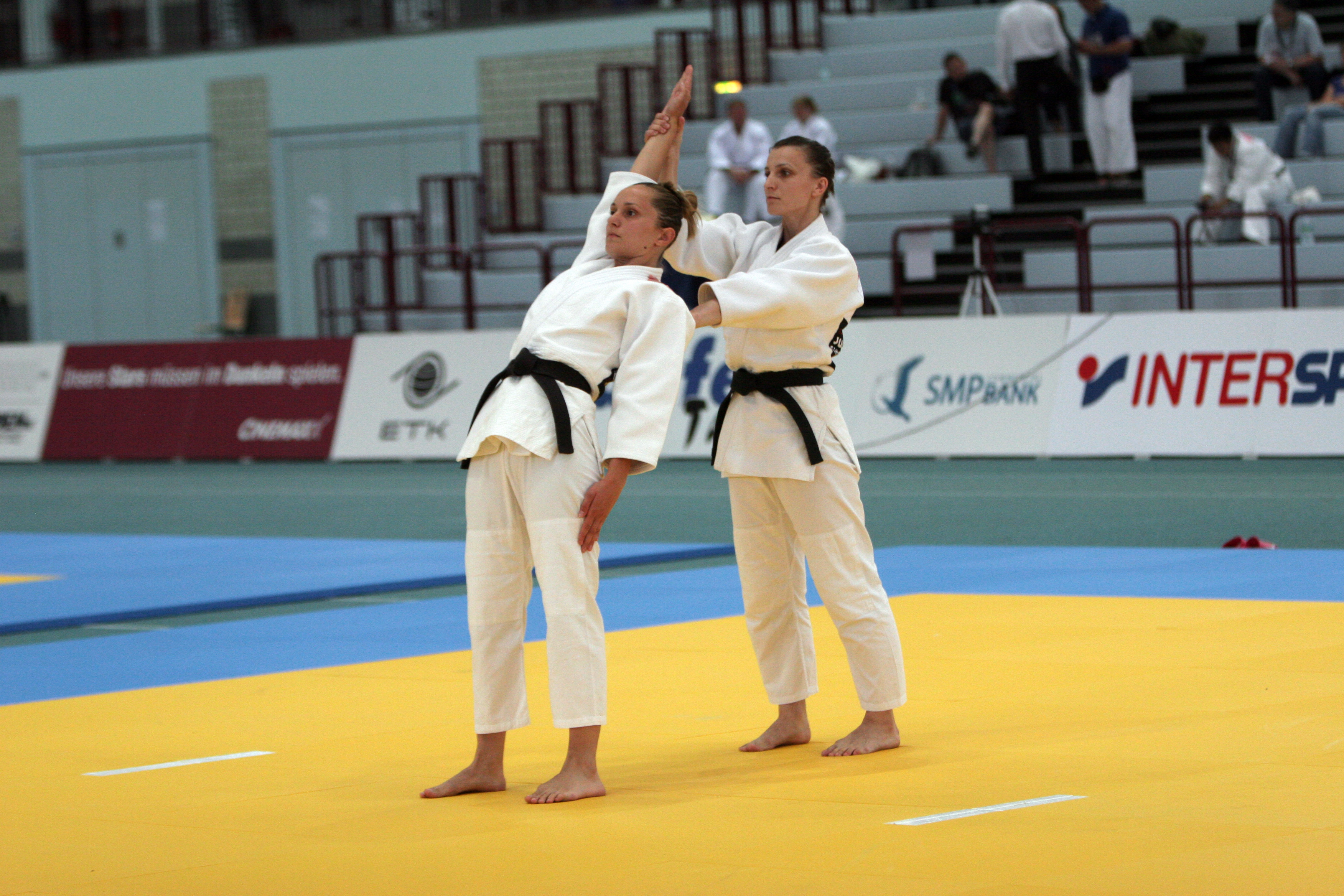 世界柔道形選手権で